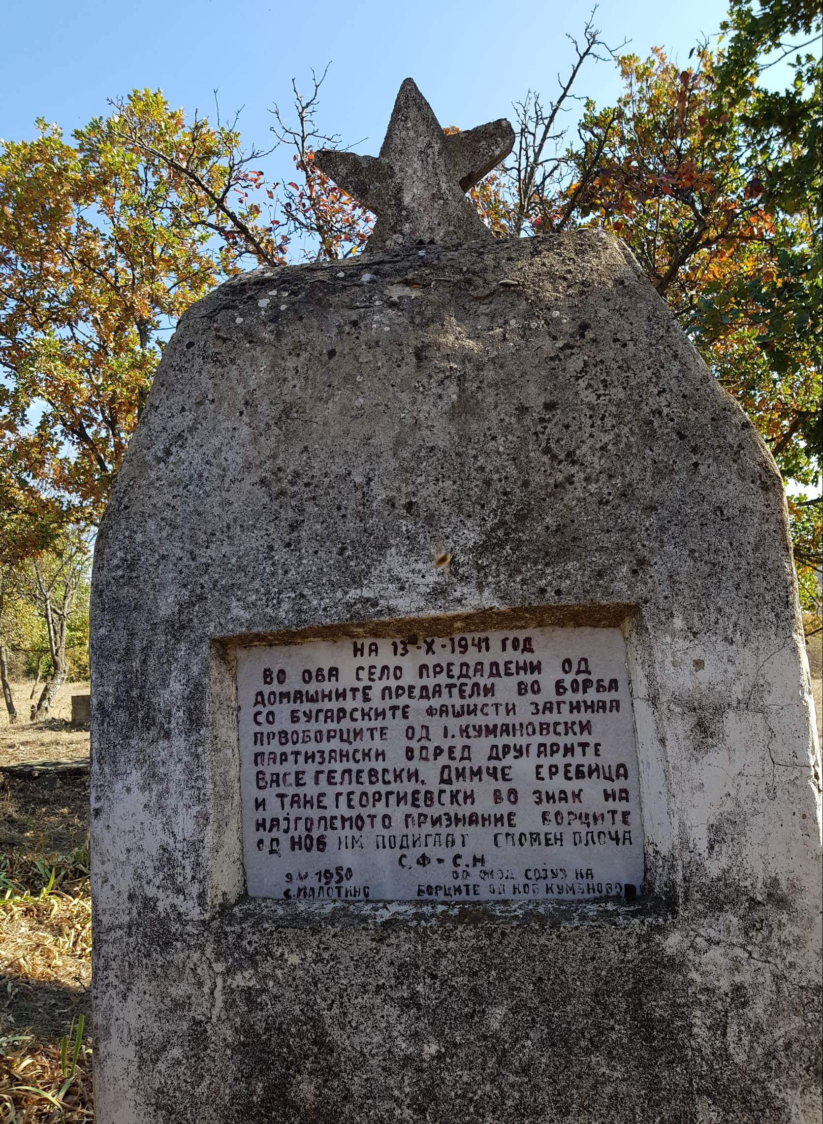 Споменик во Молотино, Кумановско, на местото каде што е разбиен Козјачкиот партизански одред во 1941 година